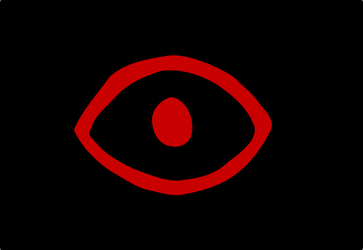 Oeil de Malesur dans Tellos